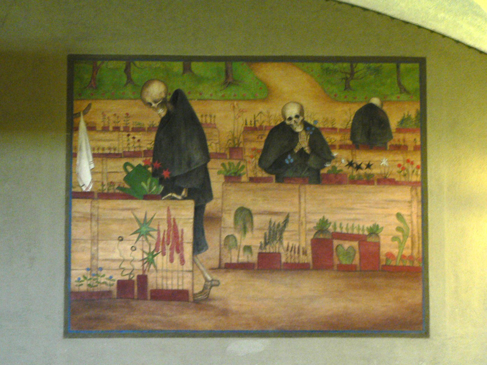 Tampereen tuomiokirkko